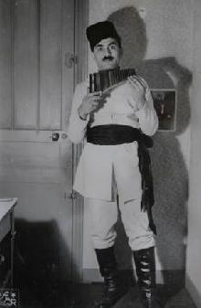 Fanica Luca